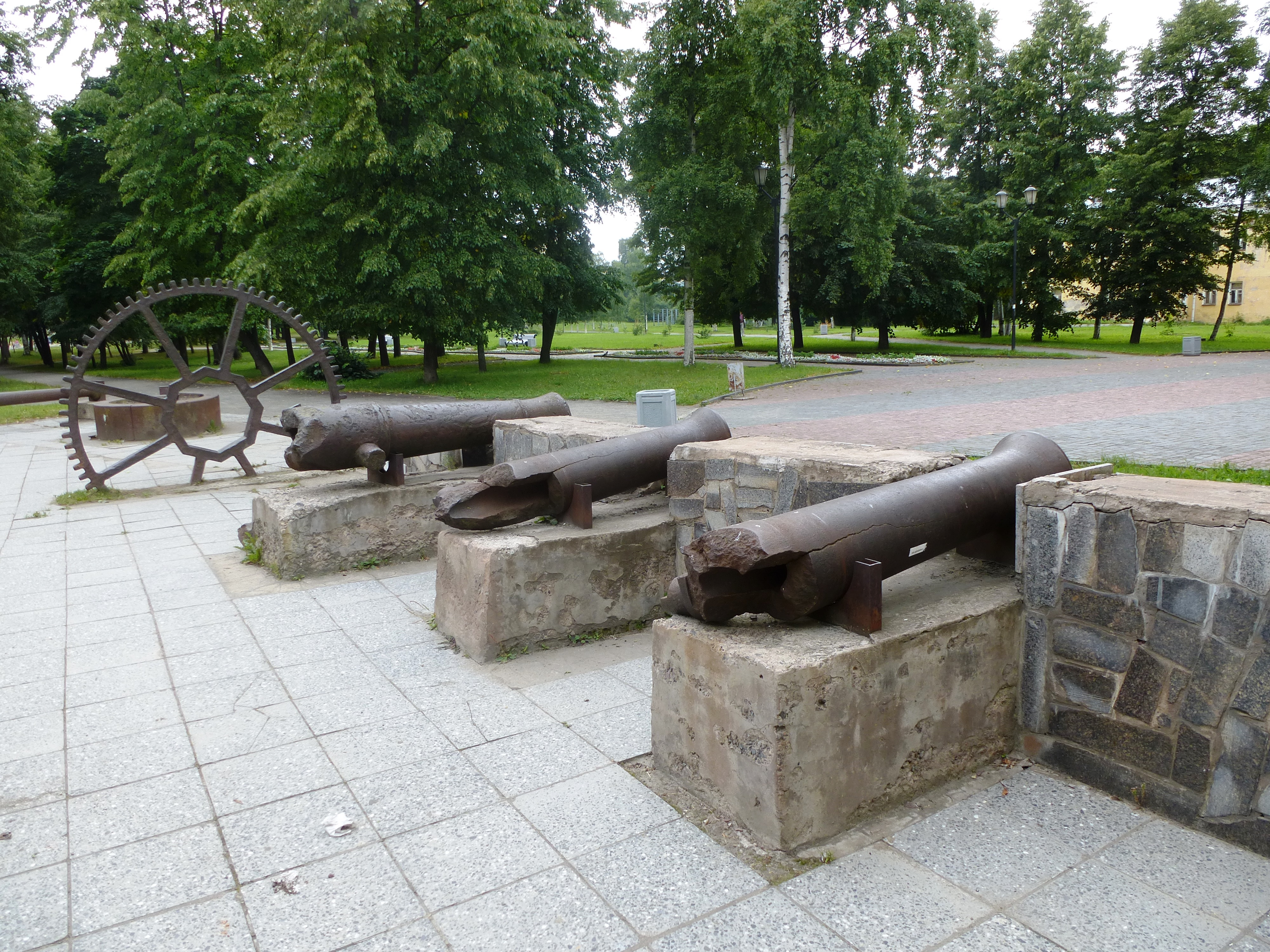 Образцы пушек Петровского (Александровского) завода в Петрозаводске в Губернаторском саду.